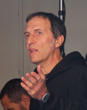 Ignacio Oliva en el rodaje de “Hereje”, junio 2015.